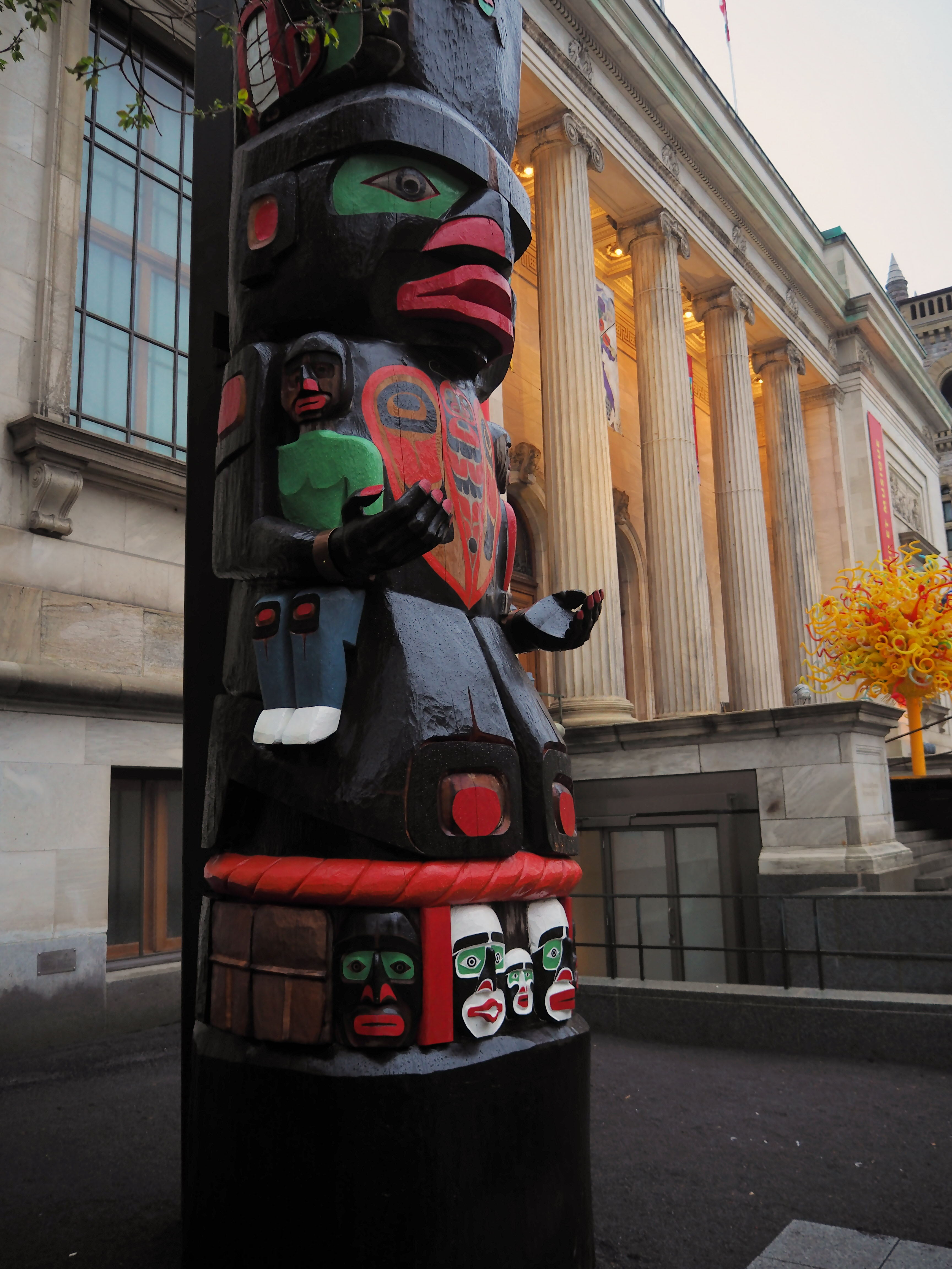 Ce totem a été créé par l’artiste Charles Joseph de la nation kwakiutl de la Colombie-Britannique. Sa stature de plus de 21 mètres impose devant le pavillon Michal et Renata Hornstein du Musée des beaux-arts de Montréal (MBAM). Le dévoilement eut lieu le 3 mai 2017, dans le cadre du 375e anniversaire de Montréal. Nommé Mât totémique des pensionnats, l'œuvre fait partie d'un parcours de l’exposition La Balade de la Paix – un musée à ciel ouvert. Il rappelle les enfants autochtones qui ont été retirés de leurs familles et placés dans des pensionnats durant la période de 1820 jusqu’en 1996, une situation que l'auteur a lui-même vécue.